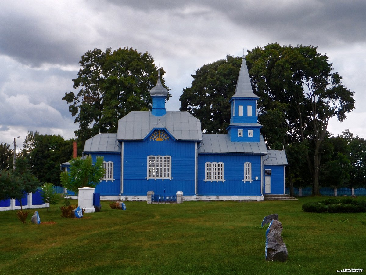 Язвінкі. Спаса-Праабражэнская царква